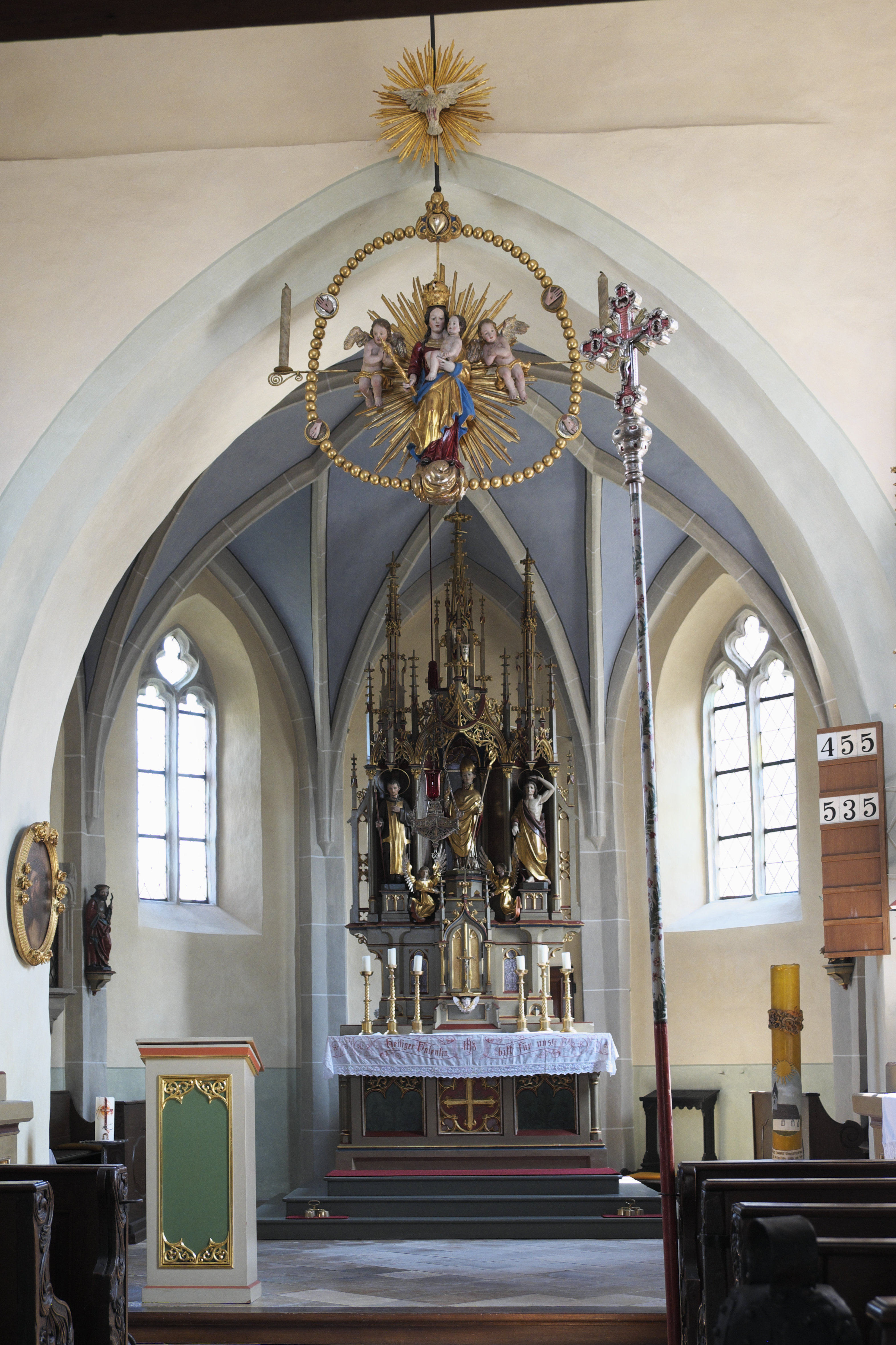 Katholische Filialkirche St. Valentin in Percha, einem Ortsteil von Starnberg, im Landkreis Starnberg (Bayern/Deutschland), Innenraum